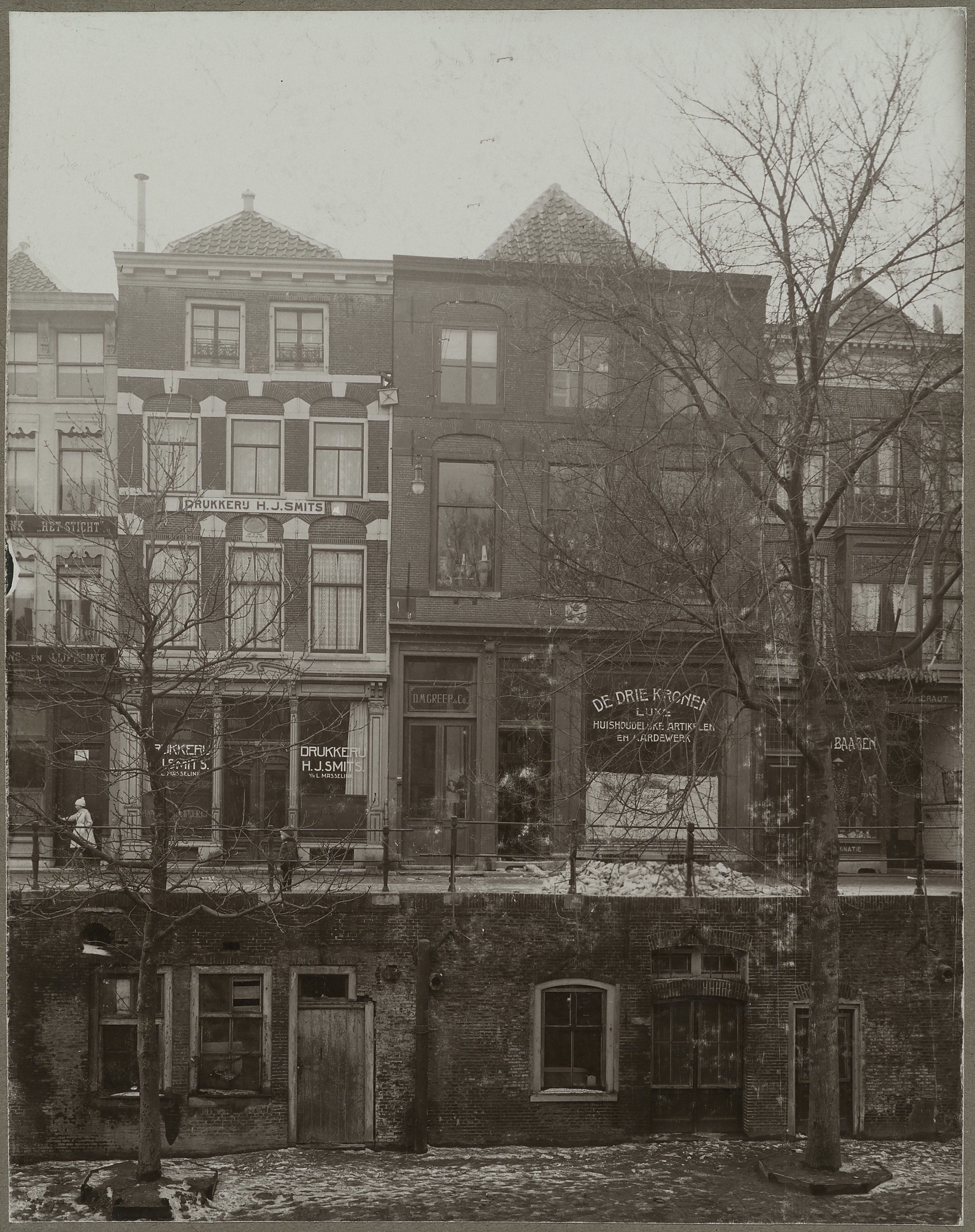 Winkel: Overzicht twee winkels en werfkelders aan kade (opmerking: Stempel: Duplicaat)